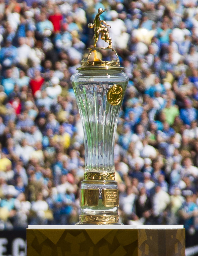 30.05.2015. Россия, Санкт-Петербург, стадион «Петровский». СОГАЗ-Чемпионат России 2014/2015, 30 тур, «Зенит» — «Локомотив». Церемония награждения команды «Зенит» золотыми медалями и кубком Чемпиона России. На снимке